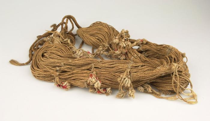 Hangmat. Katoenen kinderhangmat